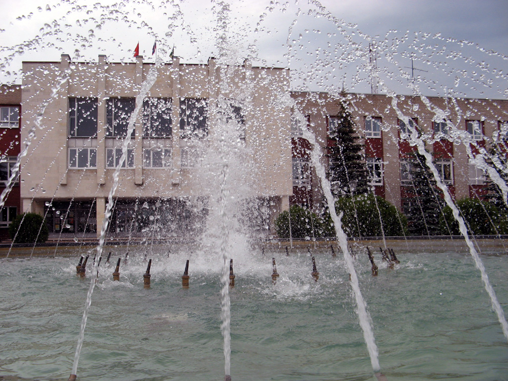 фонтан у площади перед зданием администрации посёлка